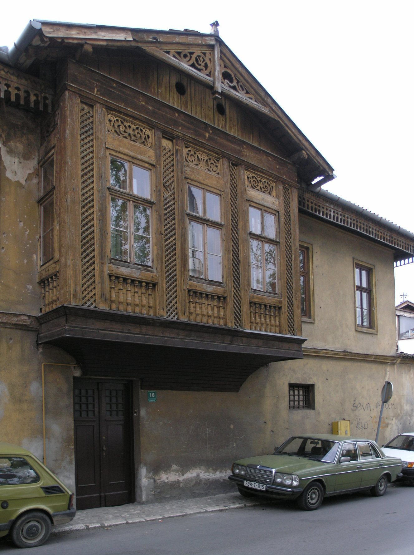 BiH, Sarajevo